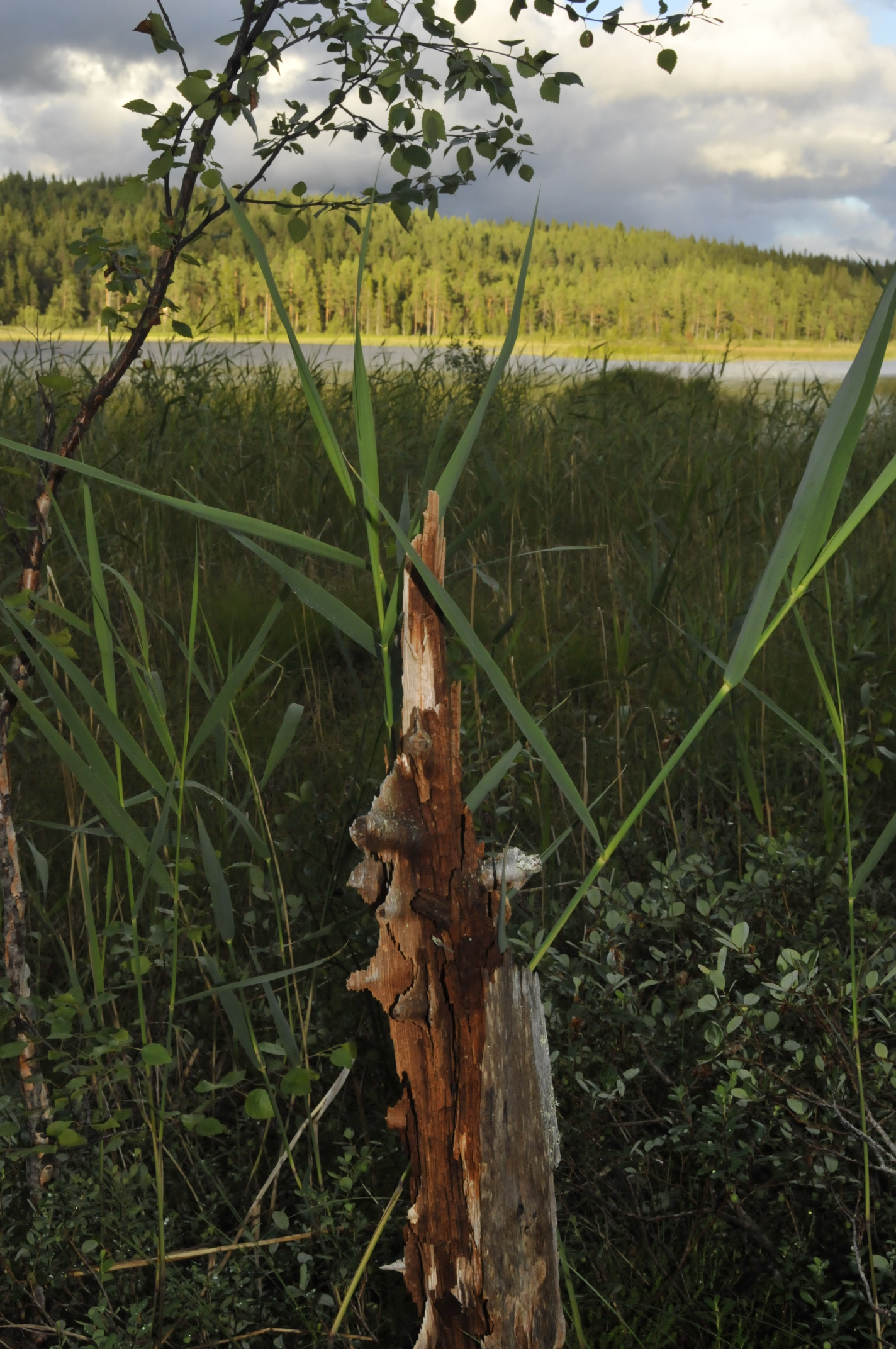 Rannåssjön i Östersund, Jämtland.